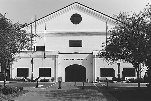 U.S. Navy Museum at the Washington Navy Yard